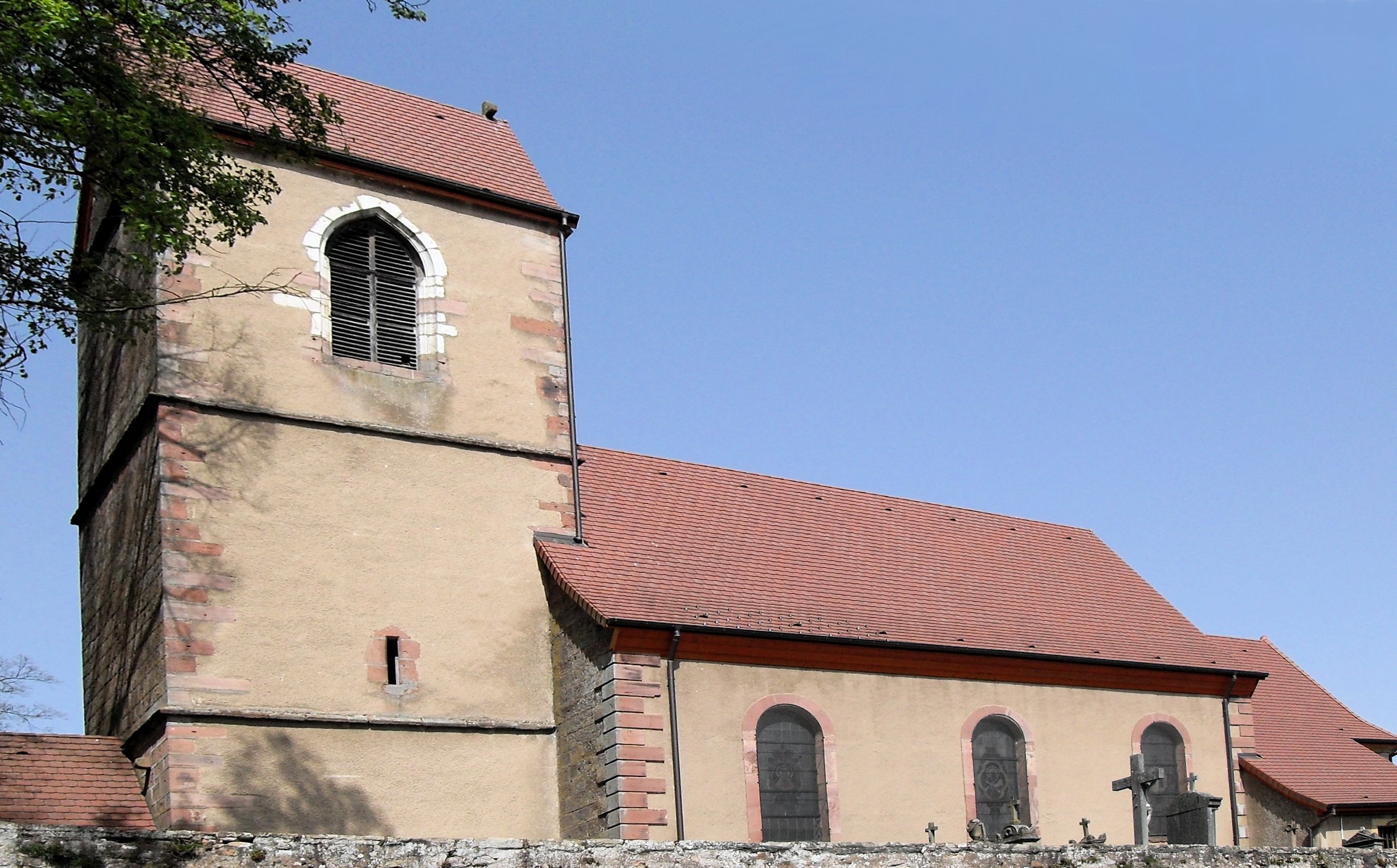 L'église Saint-Côme et Saint-Damien à Saint-Cosme